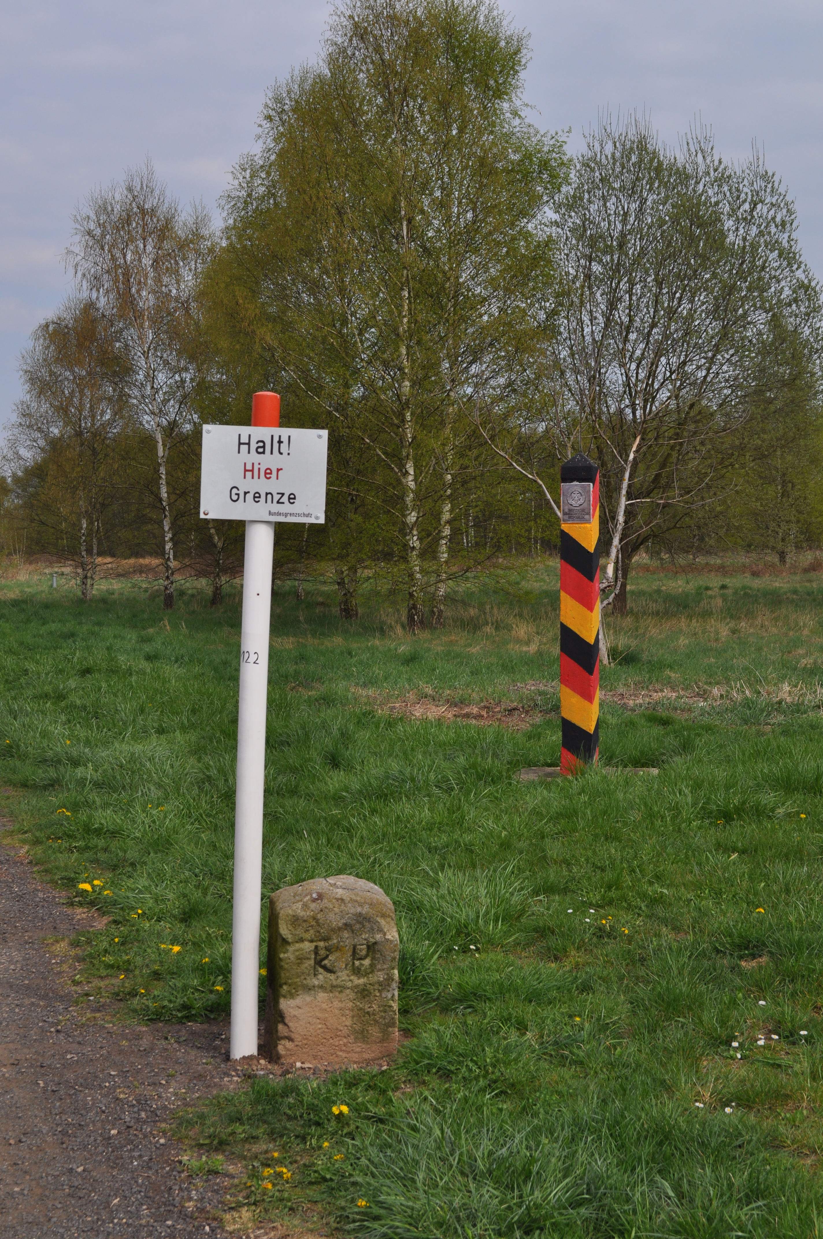 Beginn des Grenzlehpfades in Obersuhl. Grenzpfosten der DDR